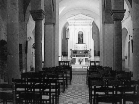 Interno della chiesa madre